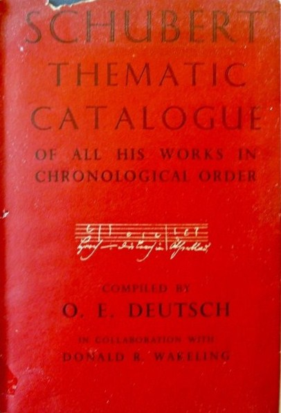 Deutschverzeichnis (Originalausgabe, London 1951) von Otto Erich Deutsch.